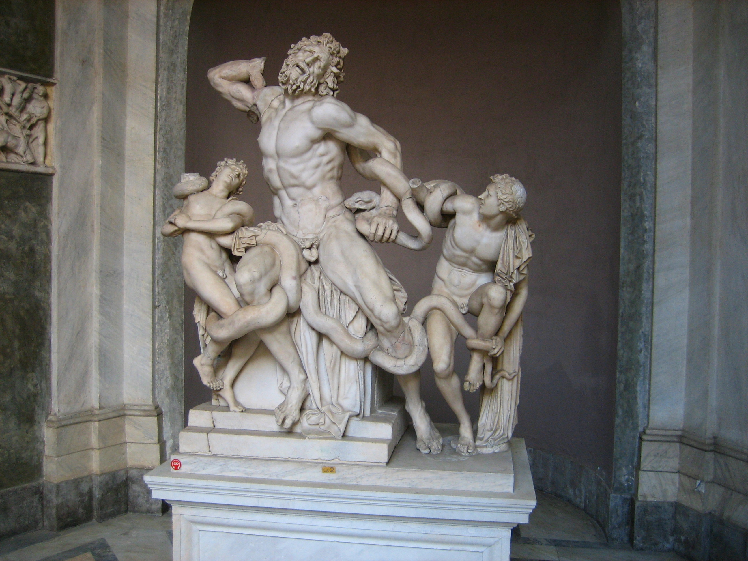 Rom Vatikanische Museen Laokoon - Museo Pio-Clementino.